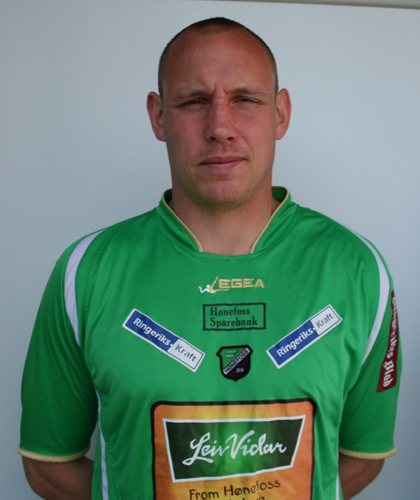 Thomas Solvoll, norsk fotballspiller som spiller for Hønefoss Ballklubb.